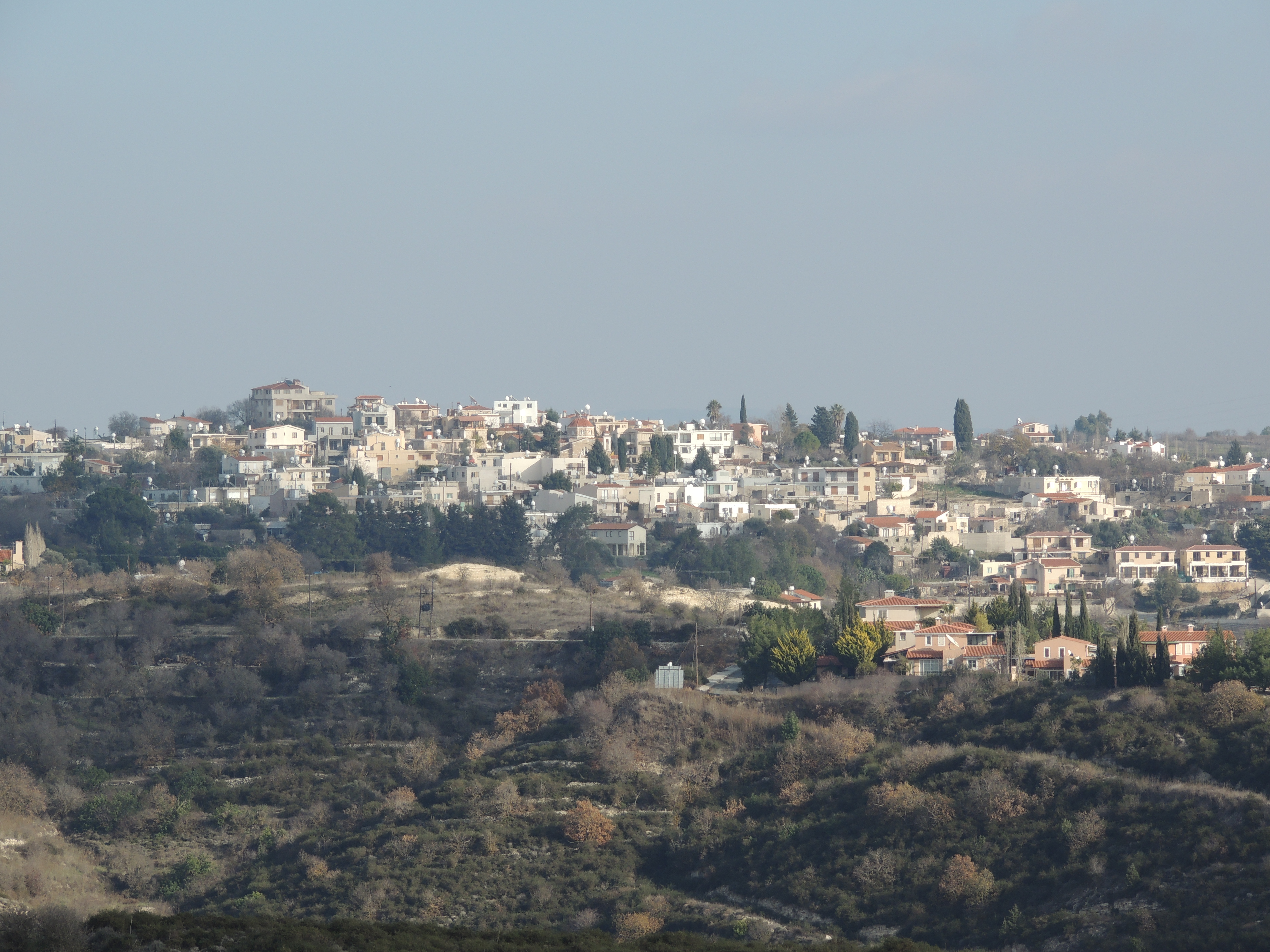 Tsada, Cyprus